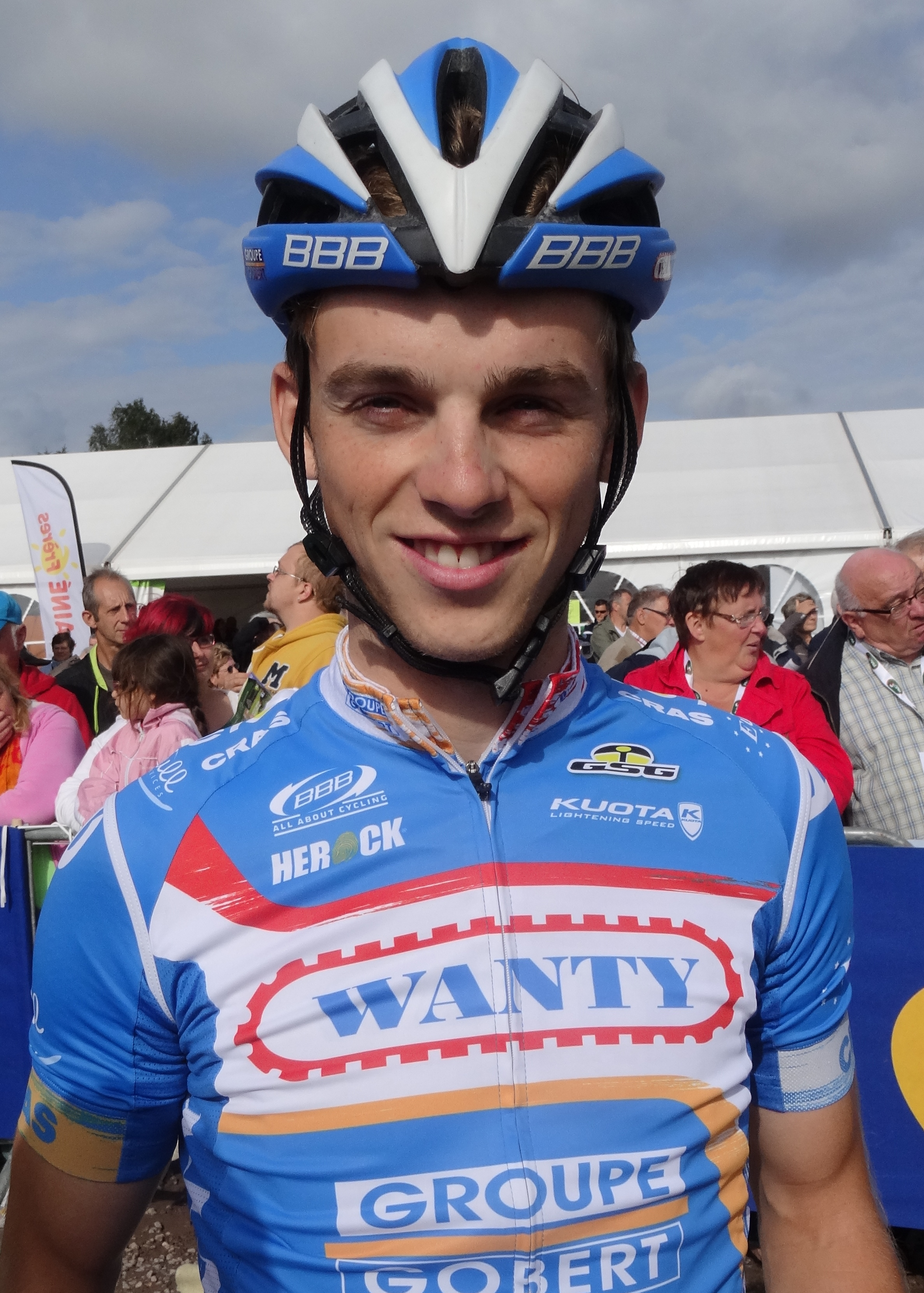 Reportage réalisé le dimanche 21 septembre à l'occasion du départ et de l'arrivée du Grand Prix d'Isbergues 2014 à Isbergues, Nord-Pas-de-Calais, France.